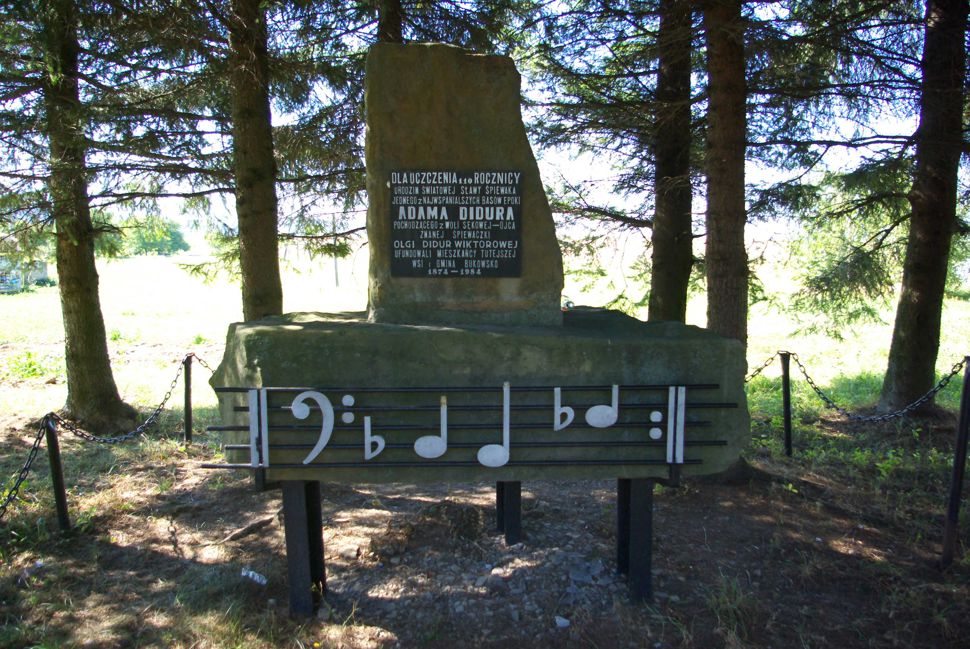 Pomnik w hołdzie Adamowi Didurowi w Woli Sękowej. Ustanowiony w 110. rocznicę urodzin (1984)